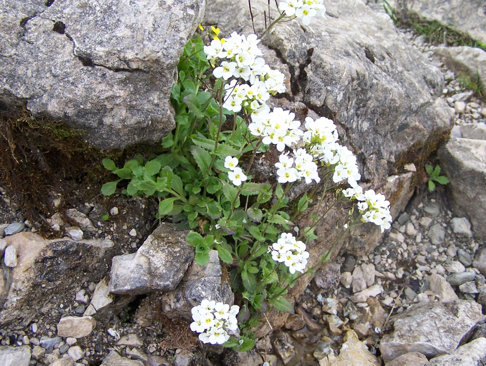 Arabis alpina (pl. gęsiówka alpejska), habitat: Tatra Mountains, Czerwone Wierchy